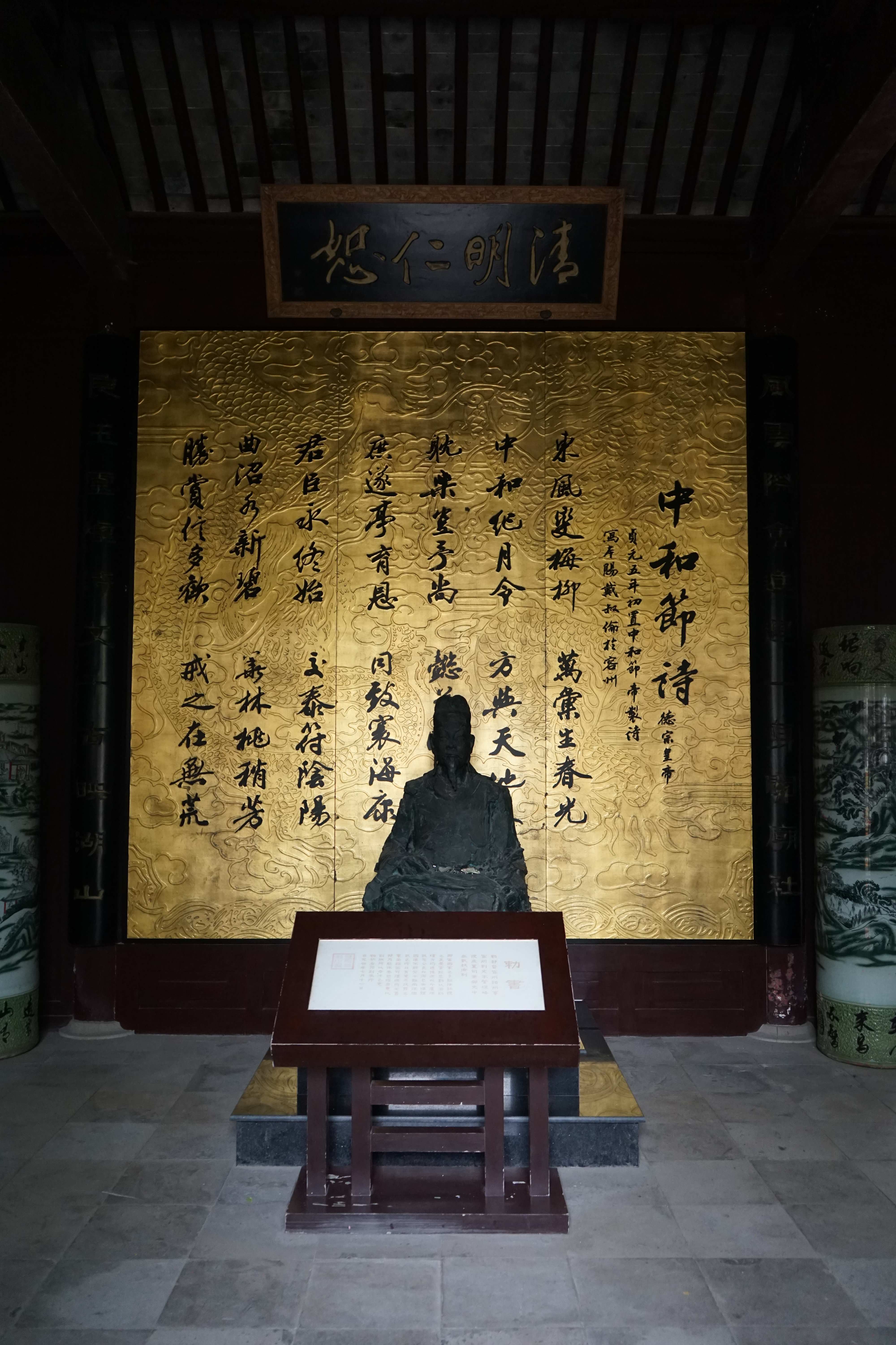 戴叔伦纪念馆。内景，包括戴叔伦雕像